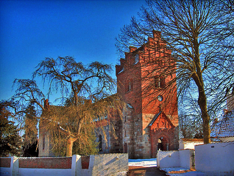 fra nordvest